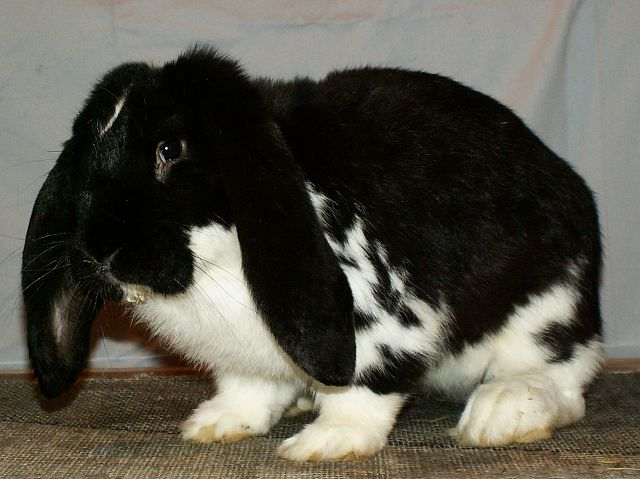 Samiec barana francuskiego